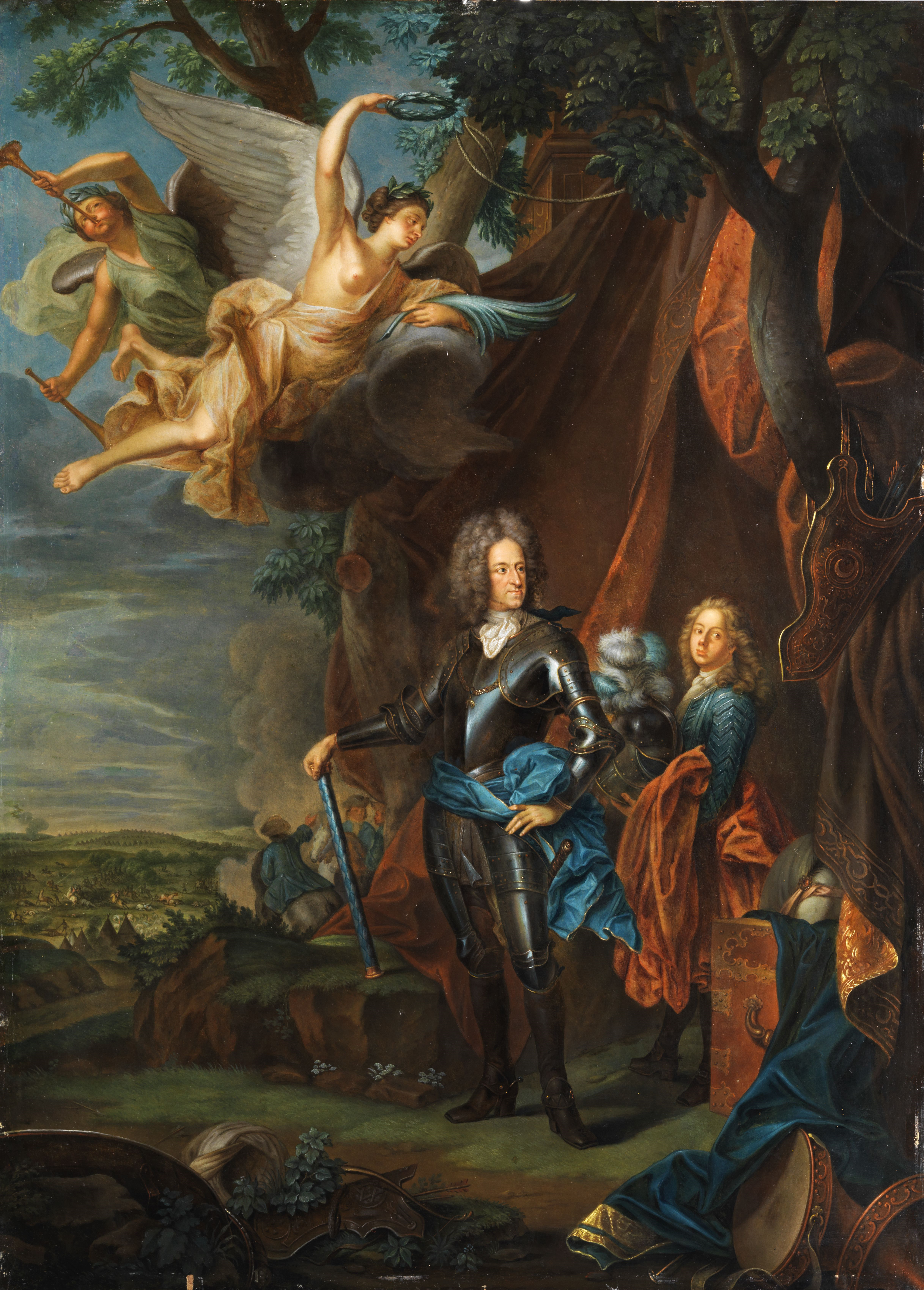 Replik